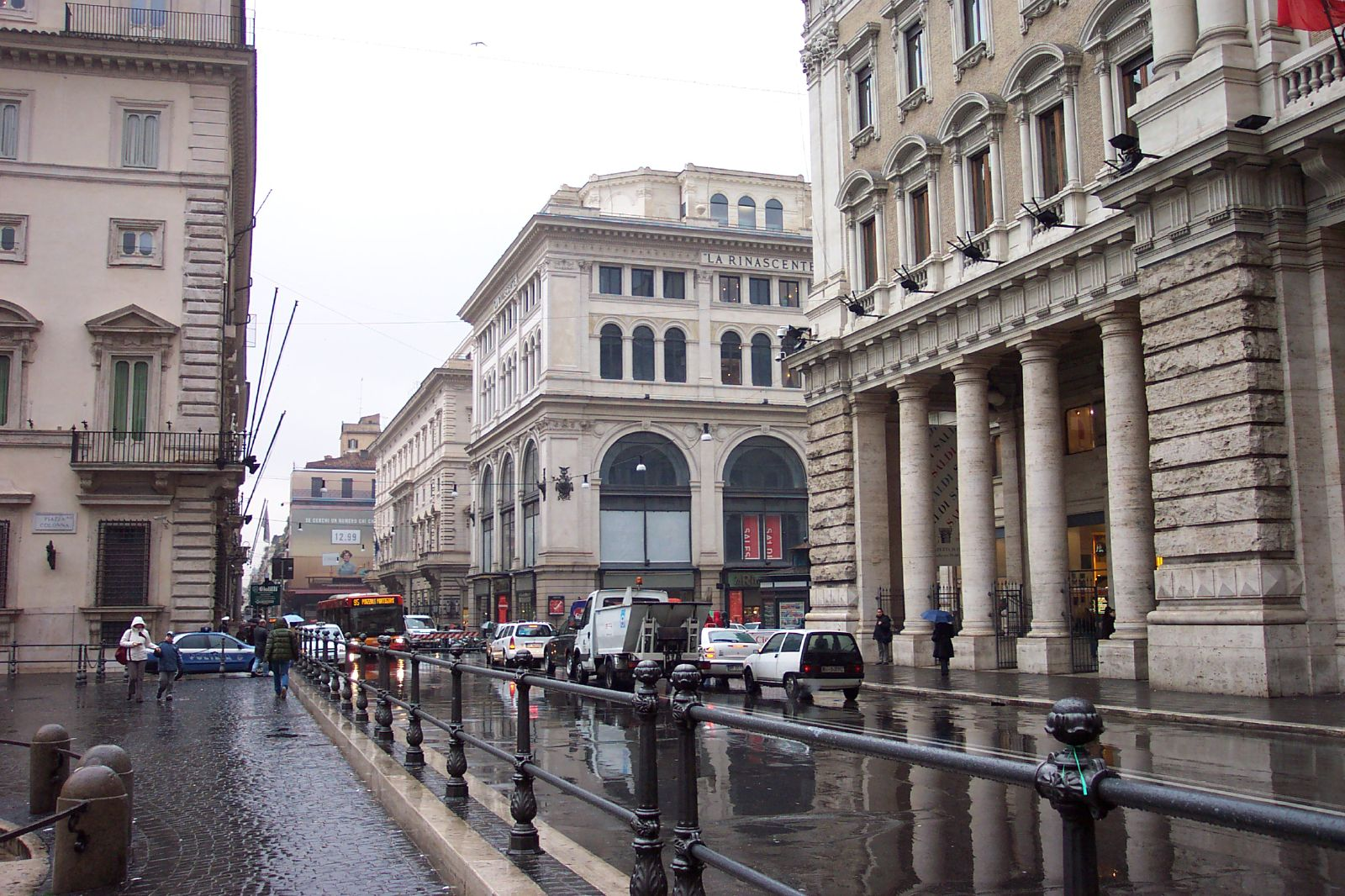 Via del Corso